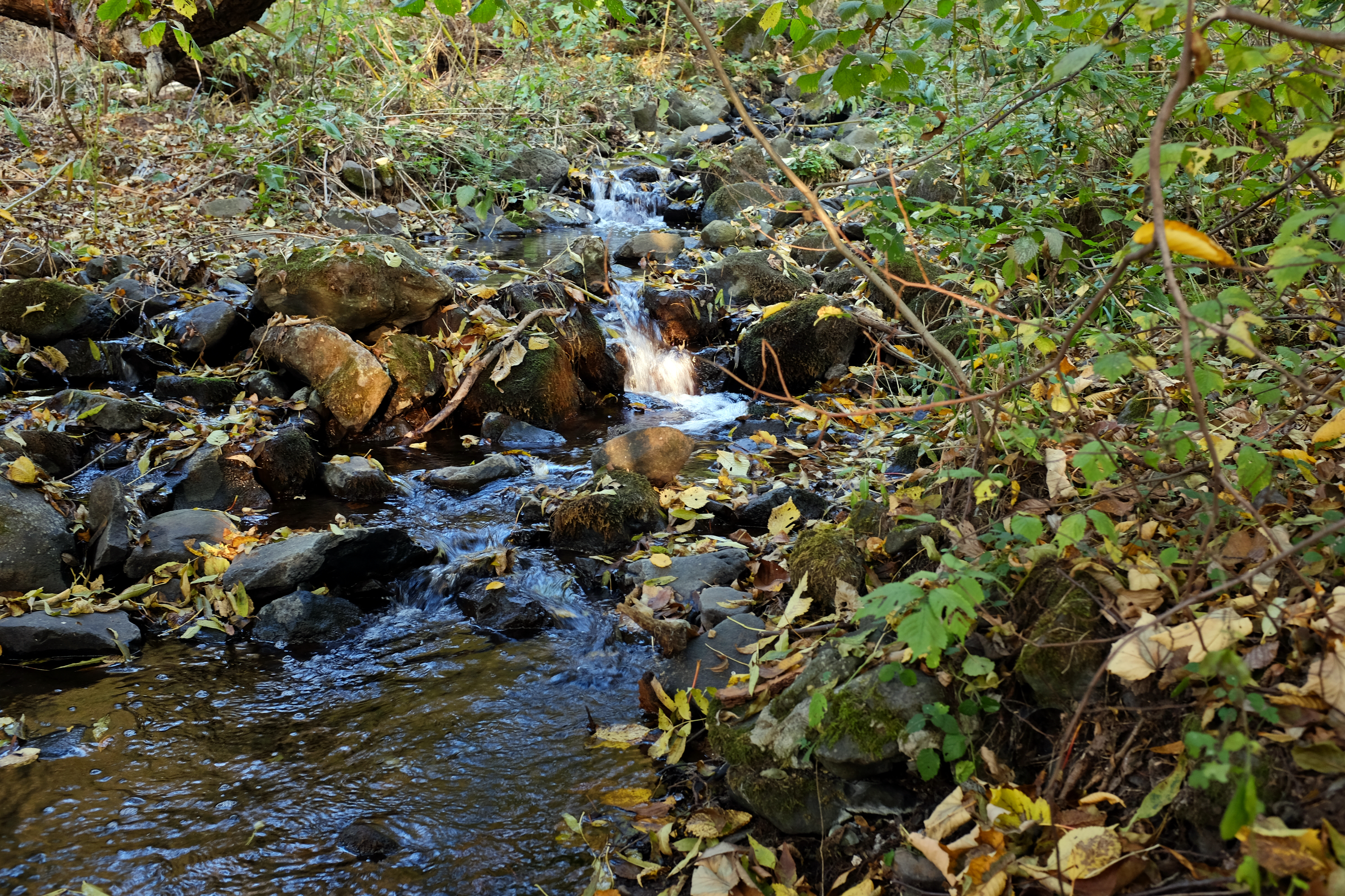 Korunní potok, přítok Ohře v Doupovských horách u obce Stráž nad Ohří